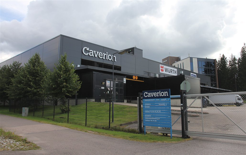 Caverion Oyj on Helsingissä kotipaikkaansa pitävä pörssiyhtiö, joka suunnittelee, toteuttaa ja ylläpitää kiinteistötekniikkaa sekä teollisuuden palveluita 12 maassa Pohjois- ja Keski-Euroopassa. Kuvassa Caverionin toimipiste Vantaan Rajatorpassa.